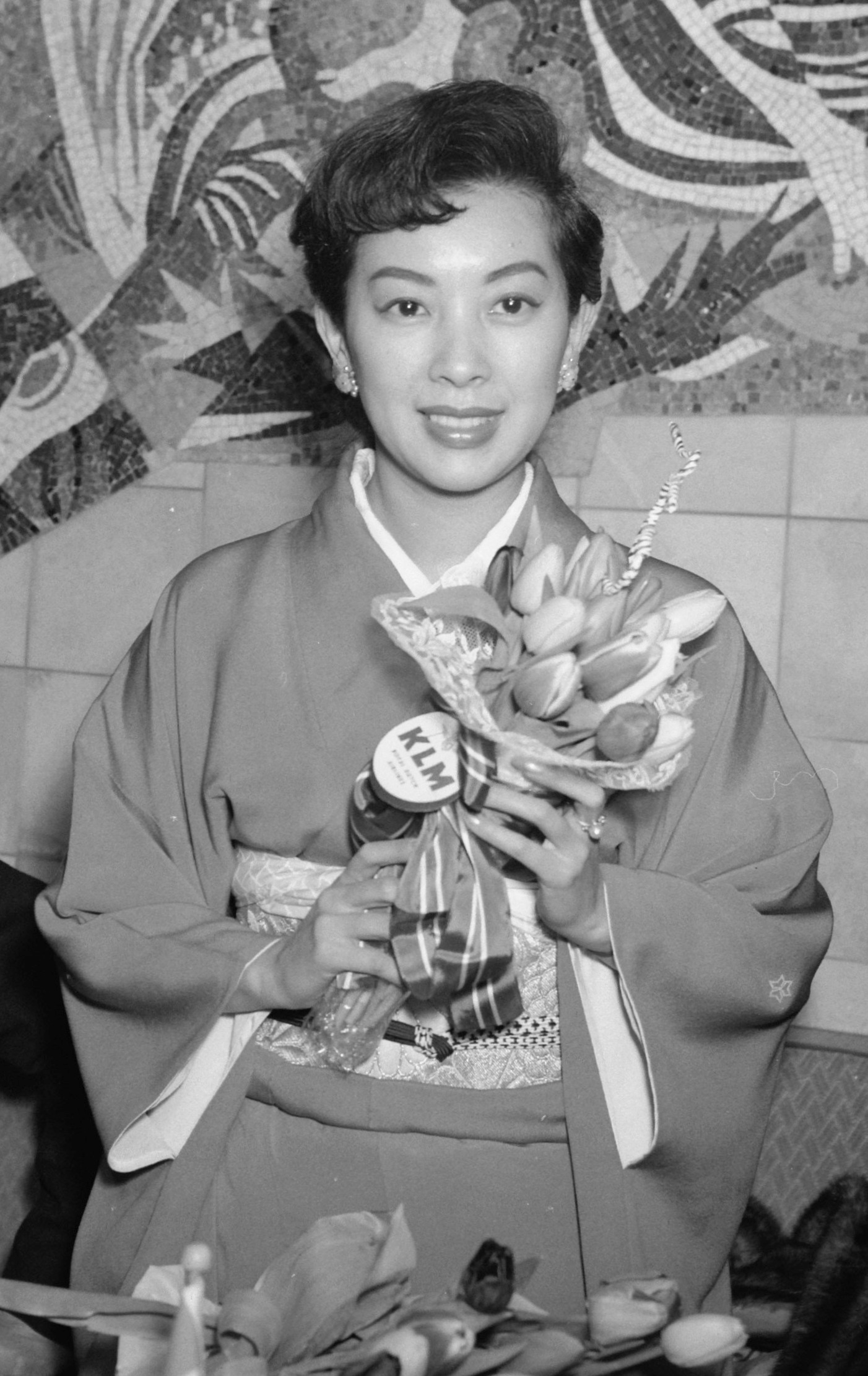 Aankomst Japanse filmster Miiko Taka (bekend van film "Sayonara") op Schiphol